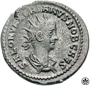 Portret van Saloninus op een antoninianus.